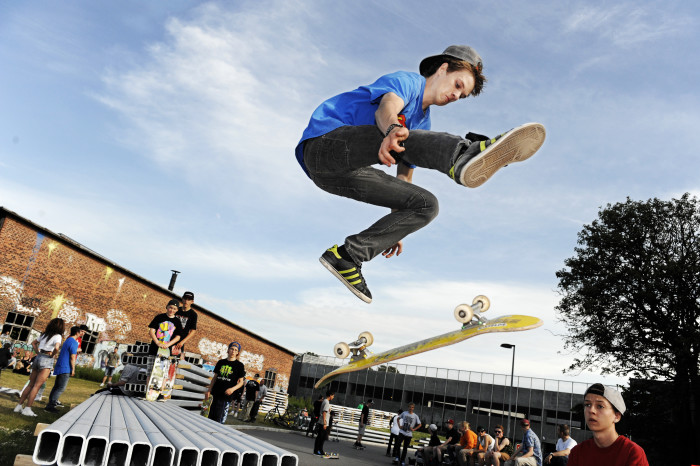 Skateboarding i Esbjerg ved den gamle remise